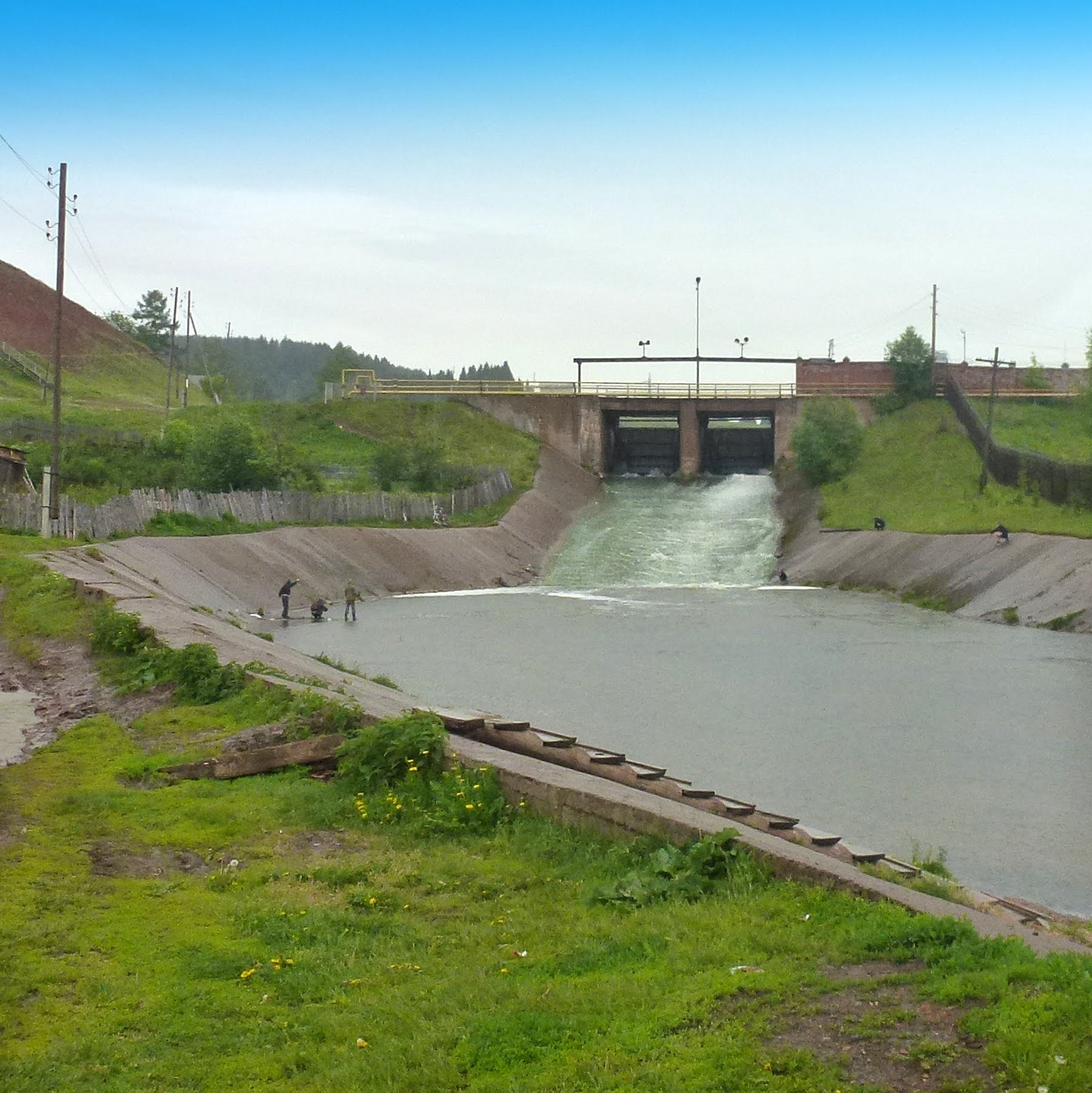 Юго-Камский, водослив из пруда